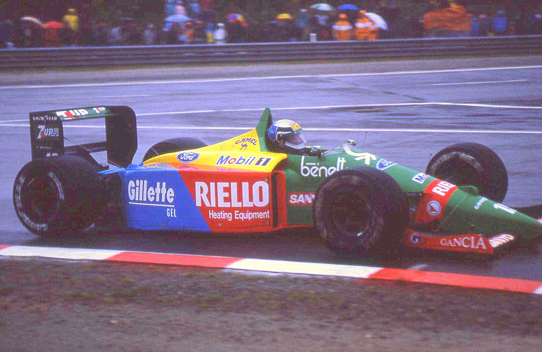 Alessandro Nannini - Benetton-Ford. scan diapo argentique.